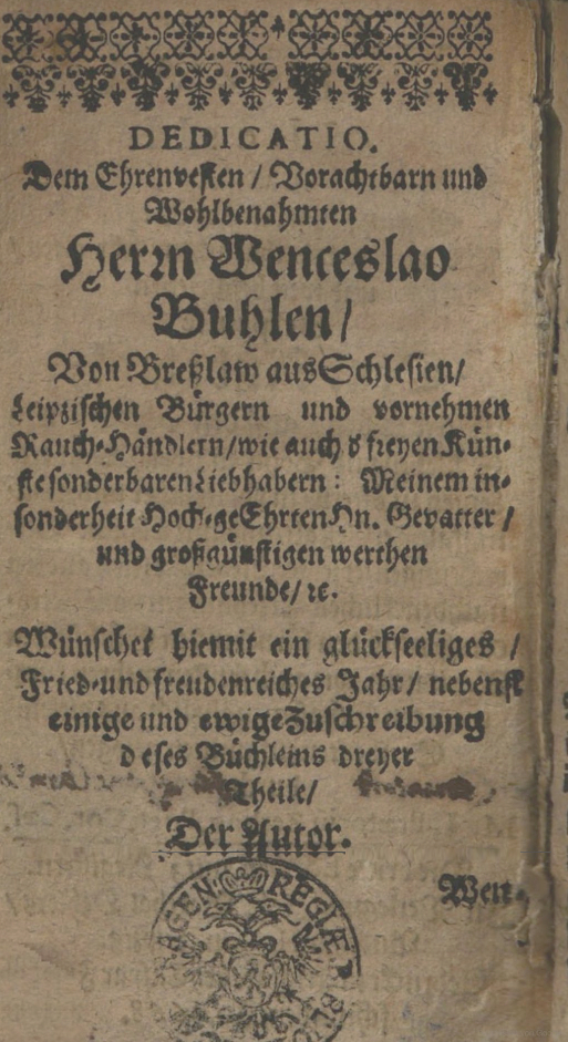 Rübezahl, Johannes Praetorius. Widmung für Wenceslav Buhlen, 1668.